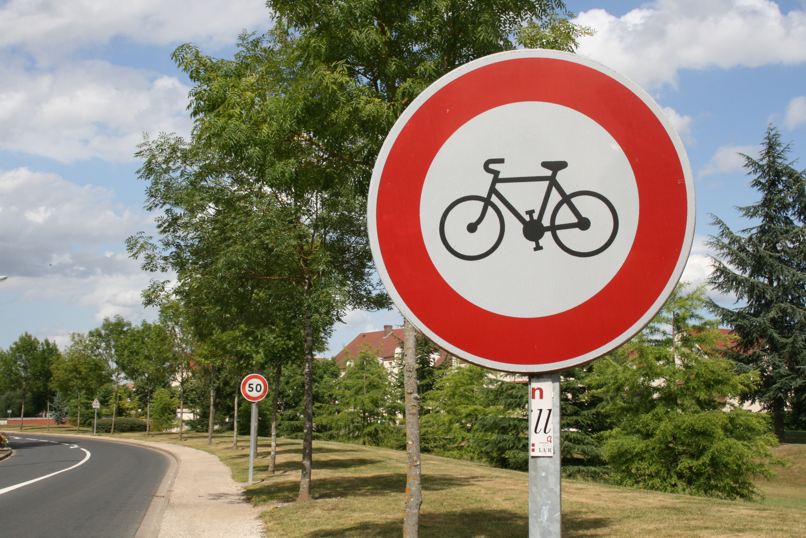 Panneau B9b d'interdiction d'accès aux cyclistes